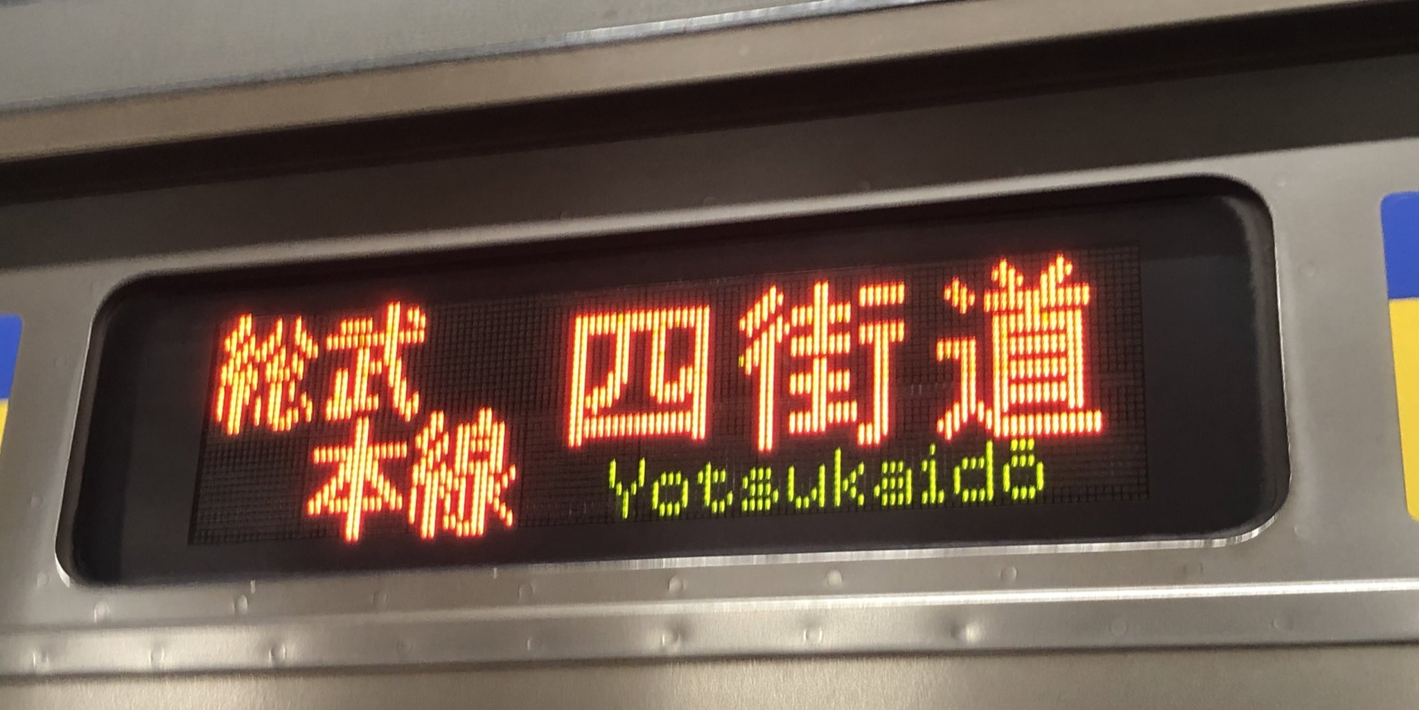 209系2100番台の四街道表示